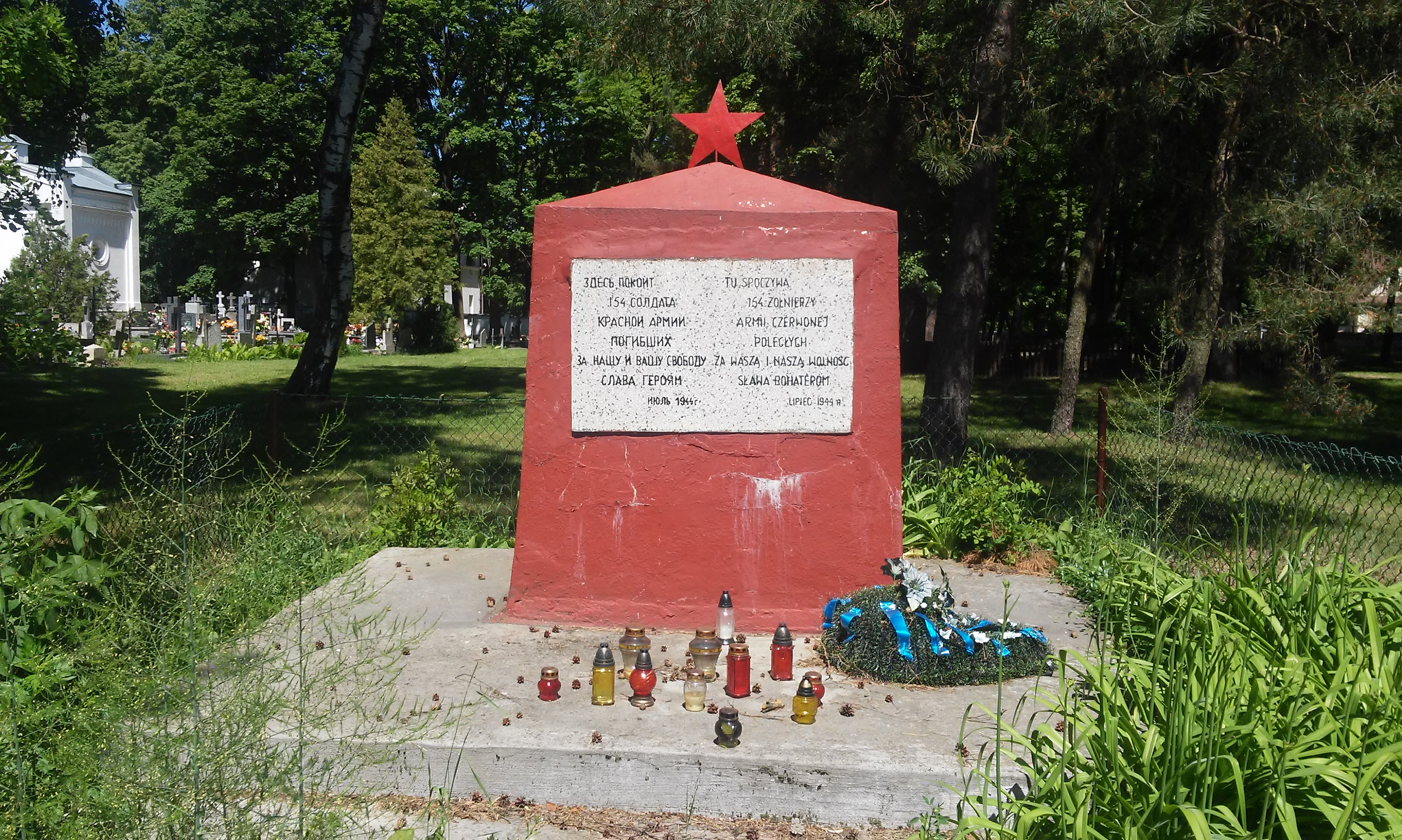 Mogiła żołnierzy radzieckich w Pratulinie